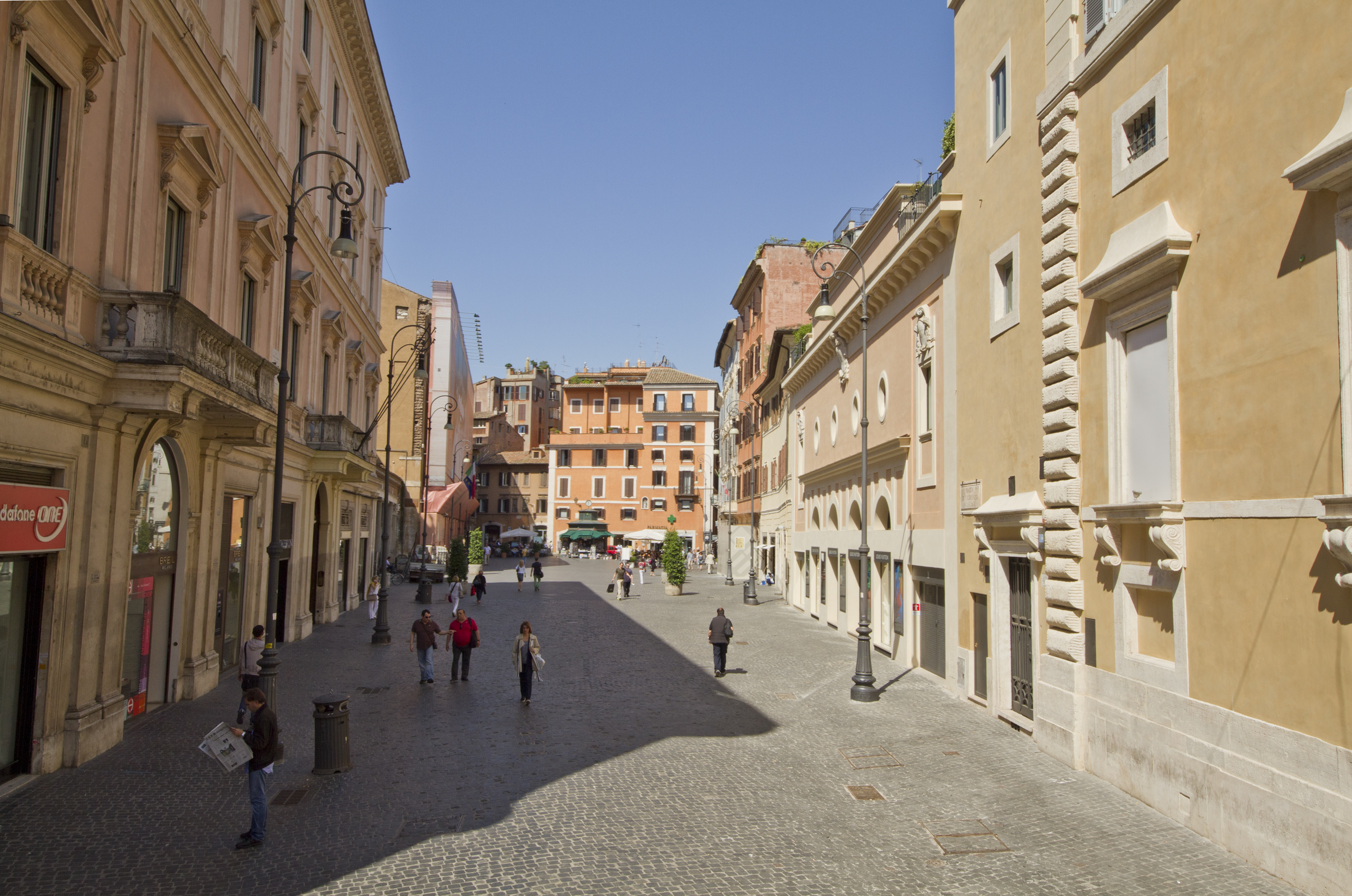 Piazza di San Lorenzo in Lucina / Via del Leoncino